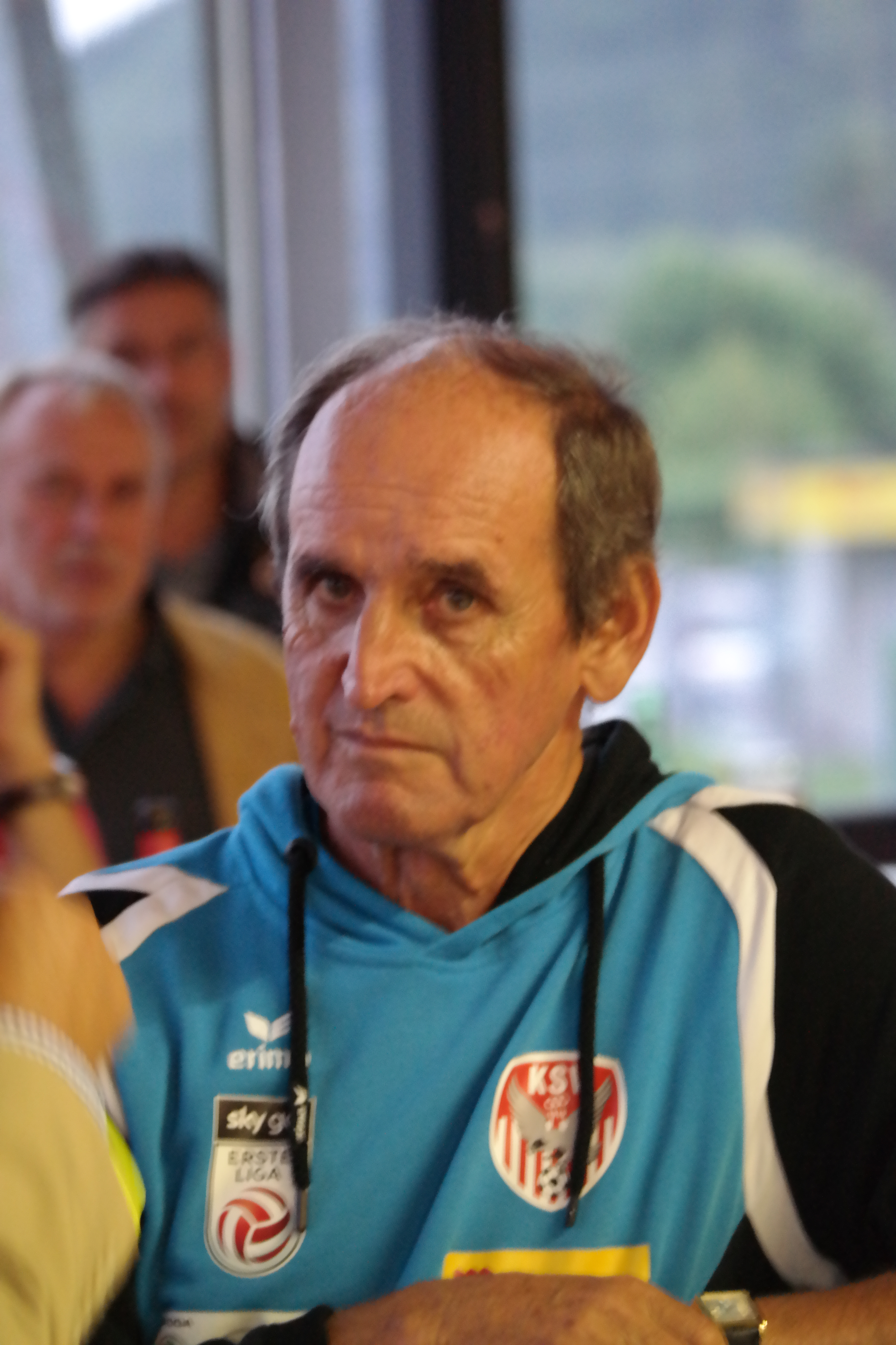 Mannschaftspräsentation der KSV im Juli 2017